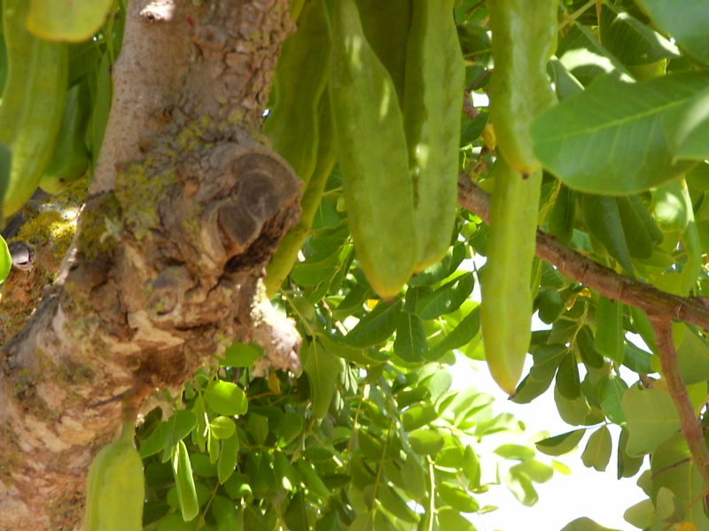 Schoten